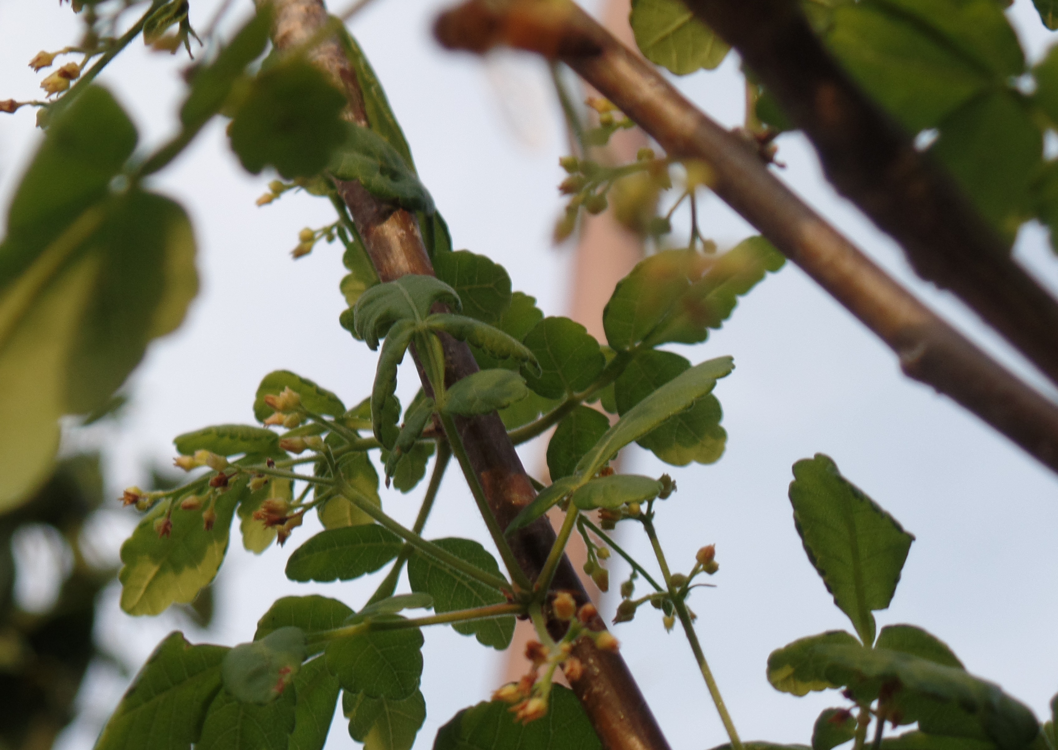 Flor y fruto de Bursera tomentosa, ejemplar del Centro Demostrativo de Tecnologías Agroecológicas de la Universidad Centroccidental Lisandro Alvarado, estado Lara-Venezuela. Conocida como marfil por el color de su madera, balsamo de incienso por su aroma o balso por lo liviano de su madera.